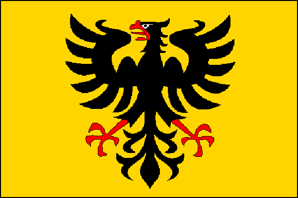 vlajka,Hostěradice , okres Znojmo